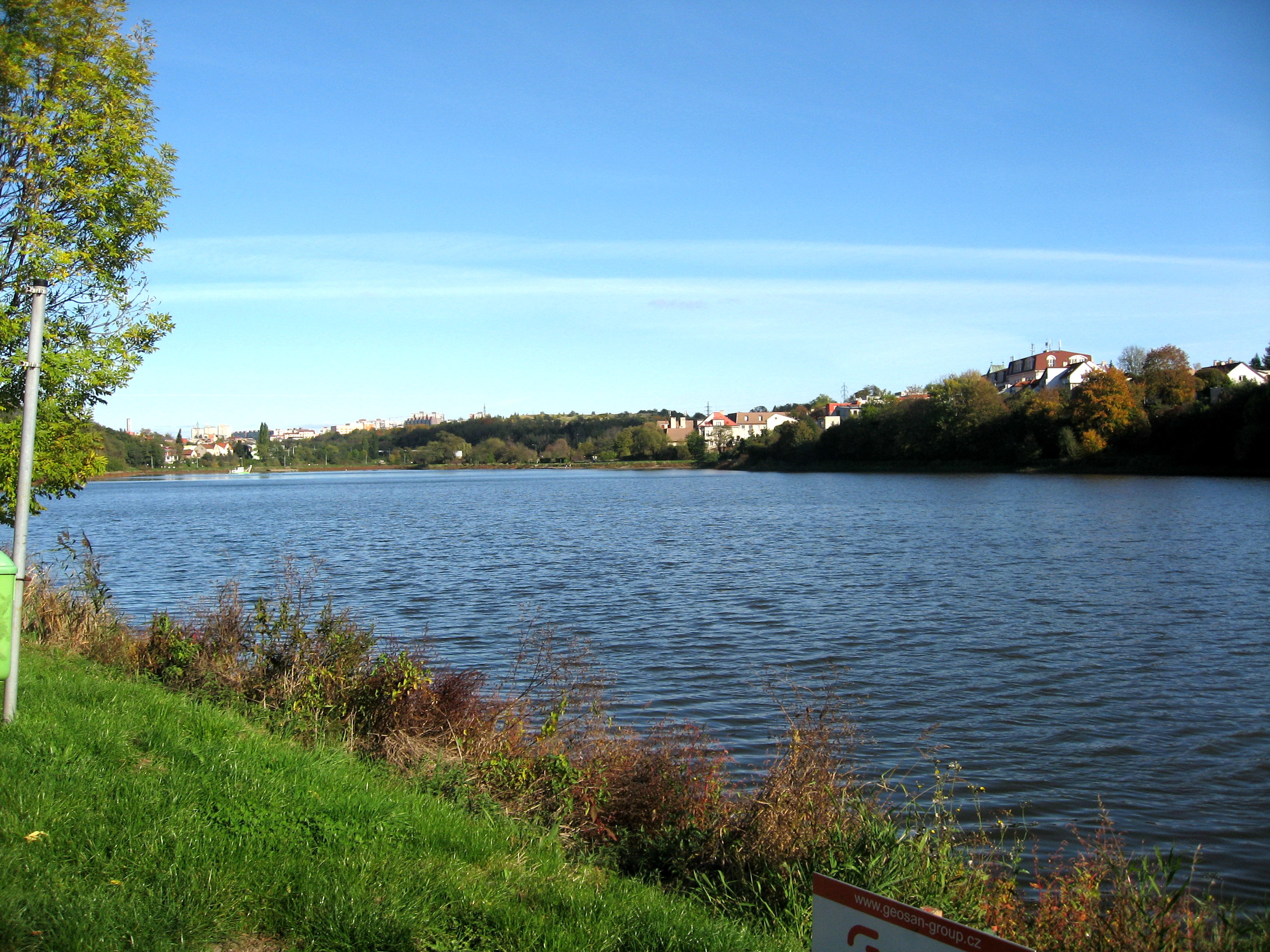 Kyjský rybník